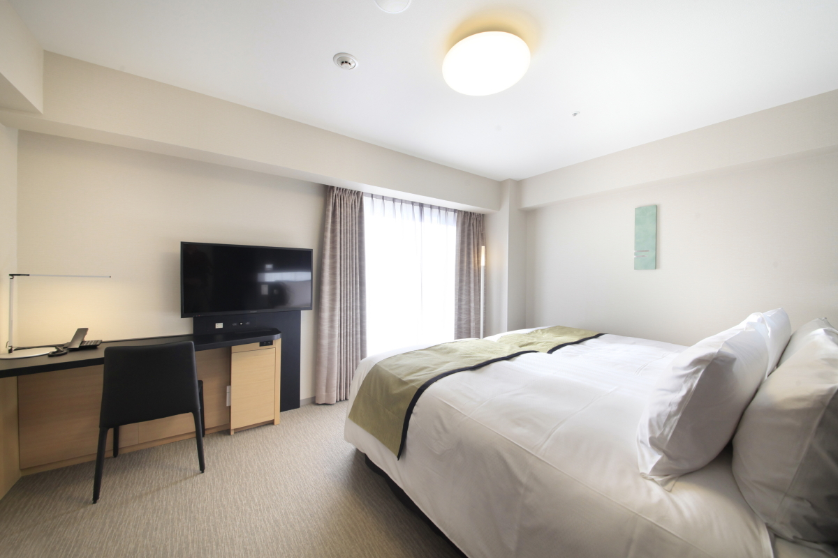 リッチモンドホテルシングルルーム